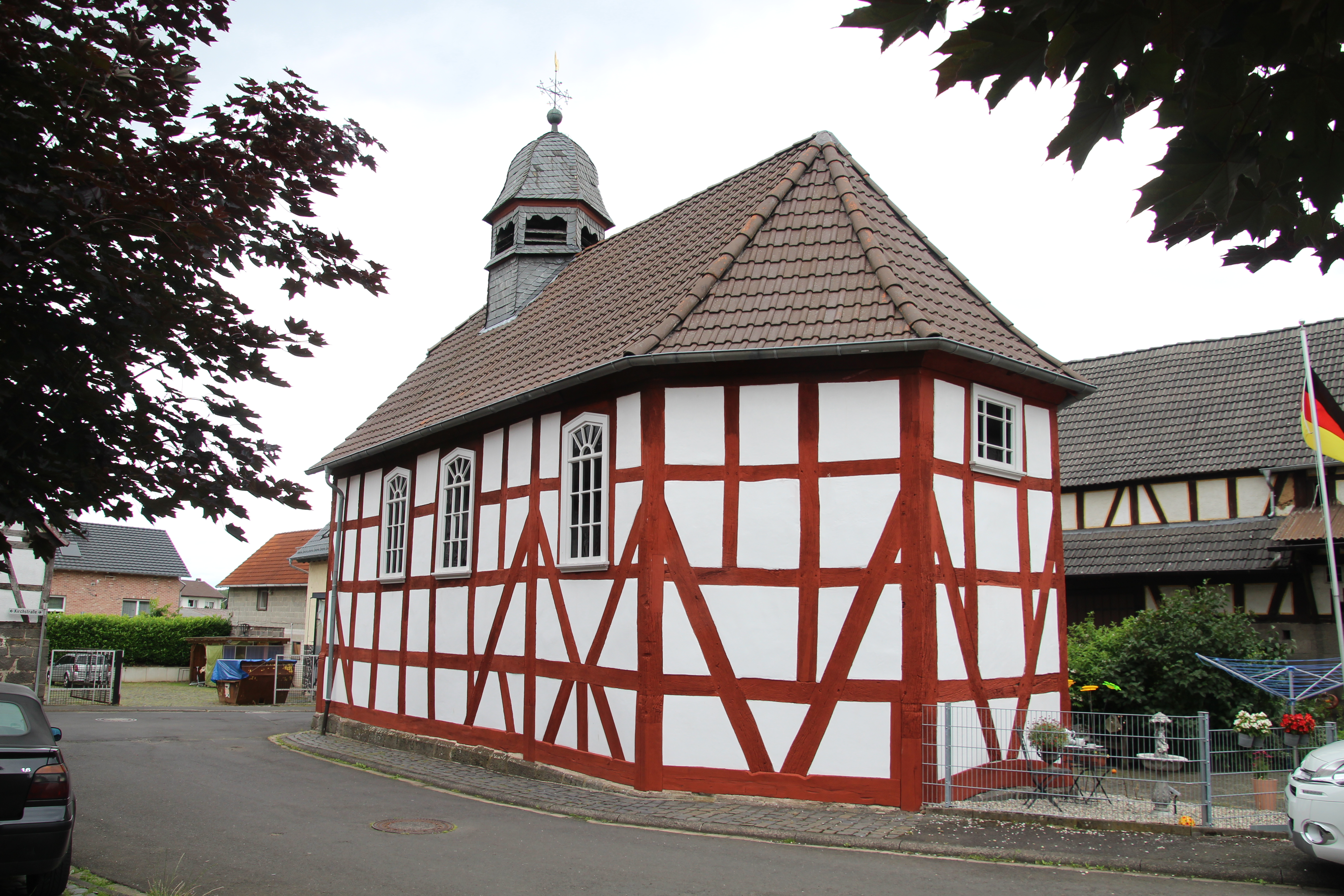 Siehe Bild und Dateiname